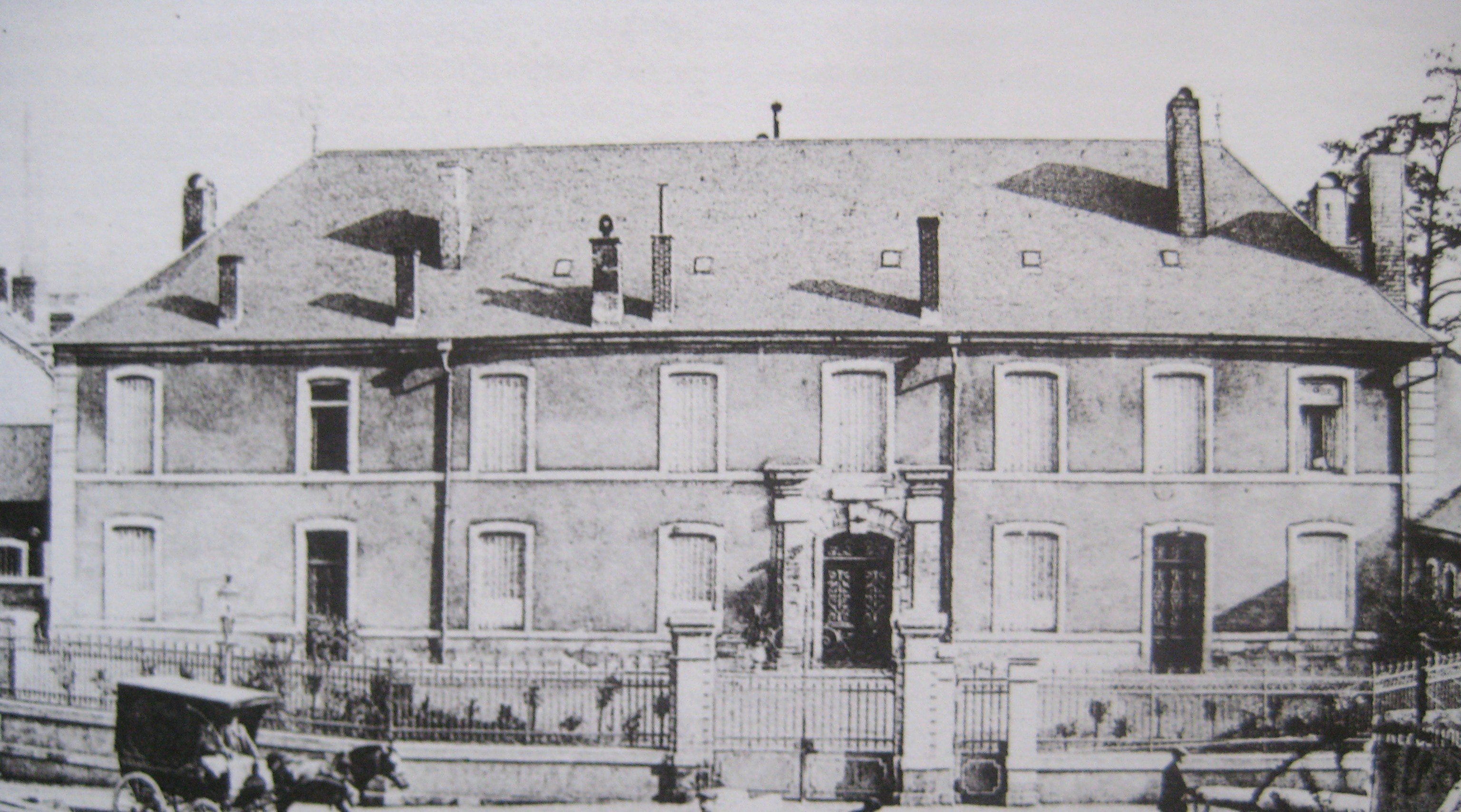 Description chateau Villerupt chateau Villerupt